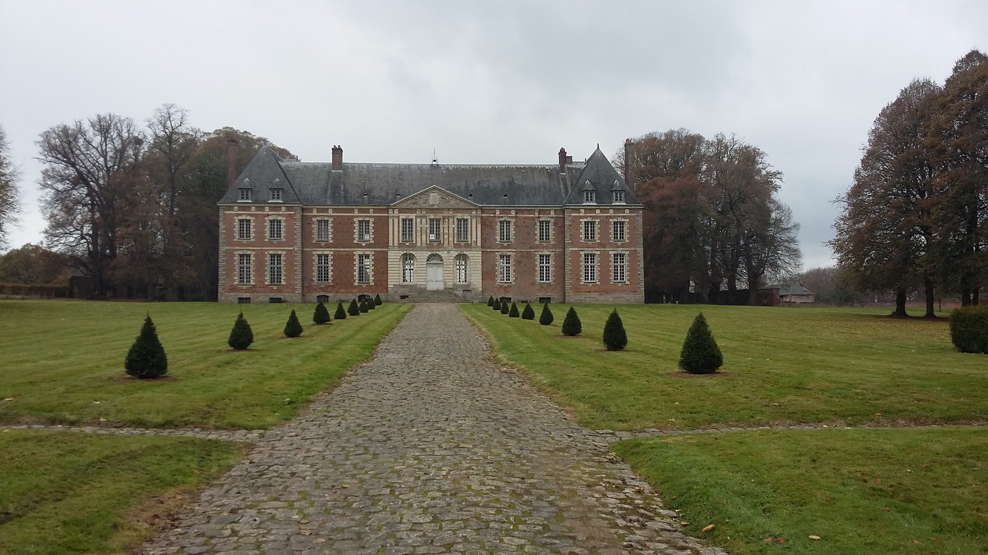 Château vu de l'entrée sud de la propriété